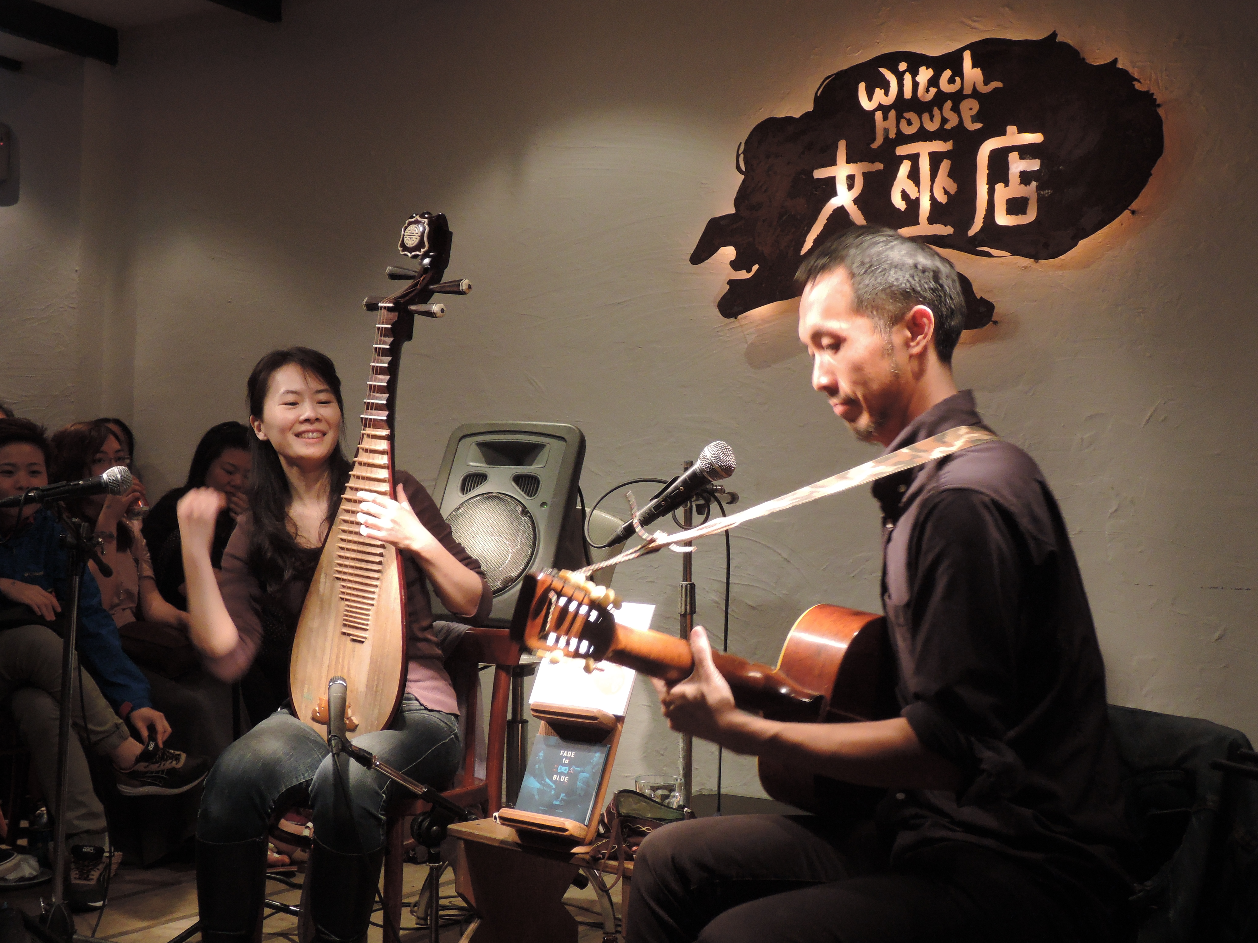 中文（台灣）: 鍾玉鳳與David Chen（藍。掉）於女巫店演出。